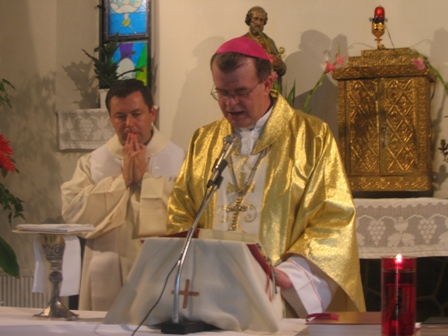 Episcopul romano-catolic Cornel Damian